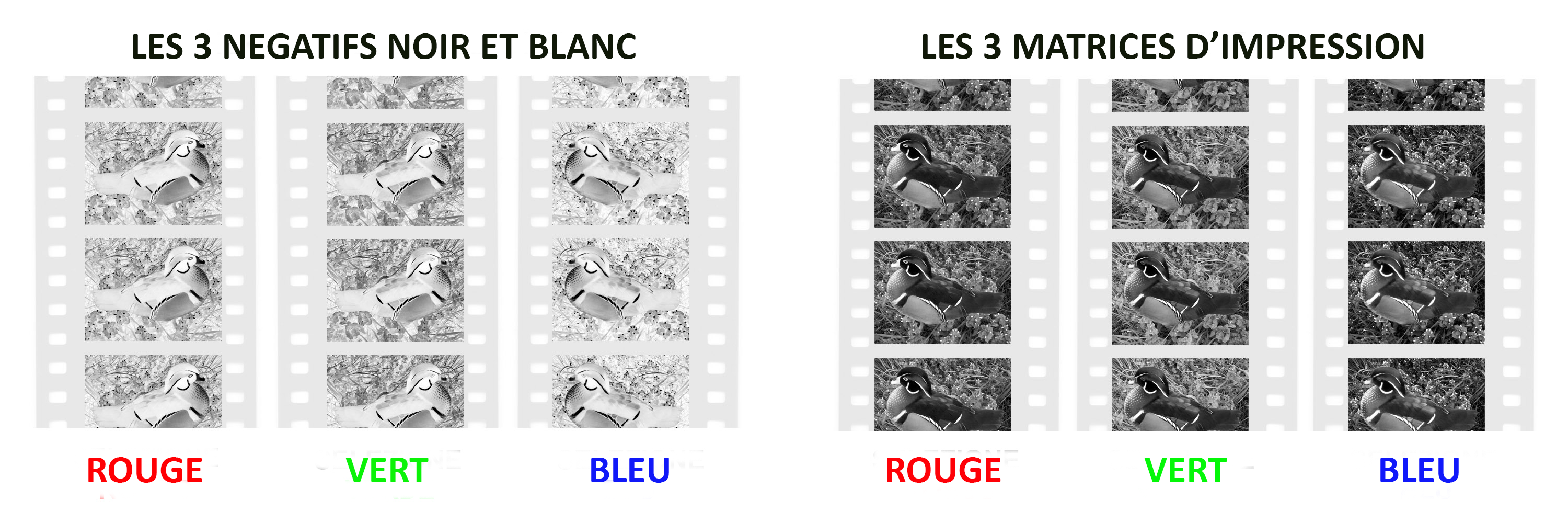 Les 6 éléments qui constituent le Technicolor trichrome.